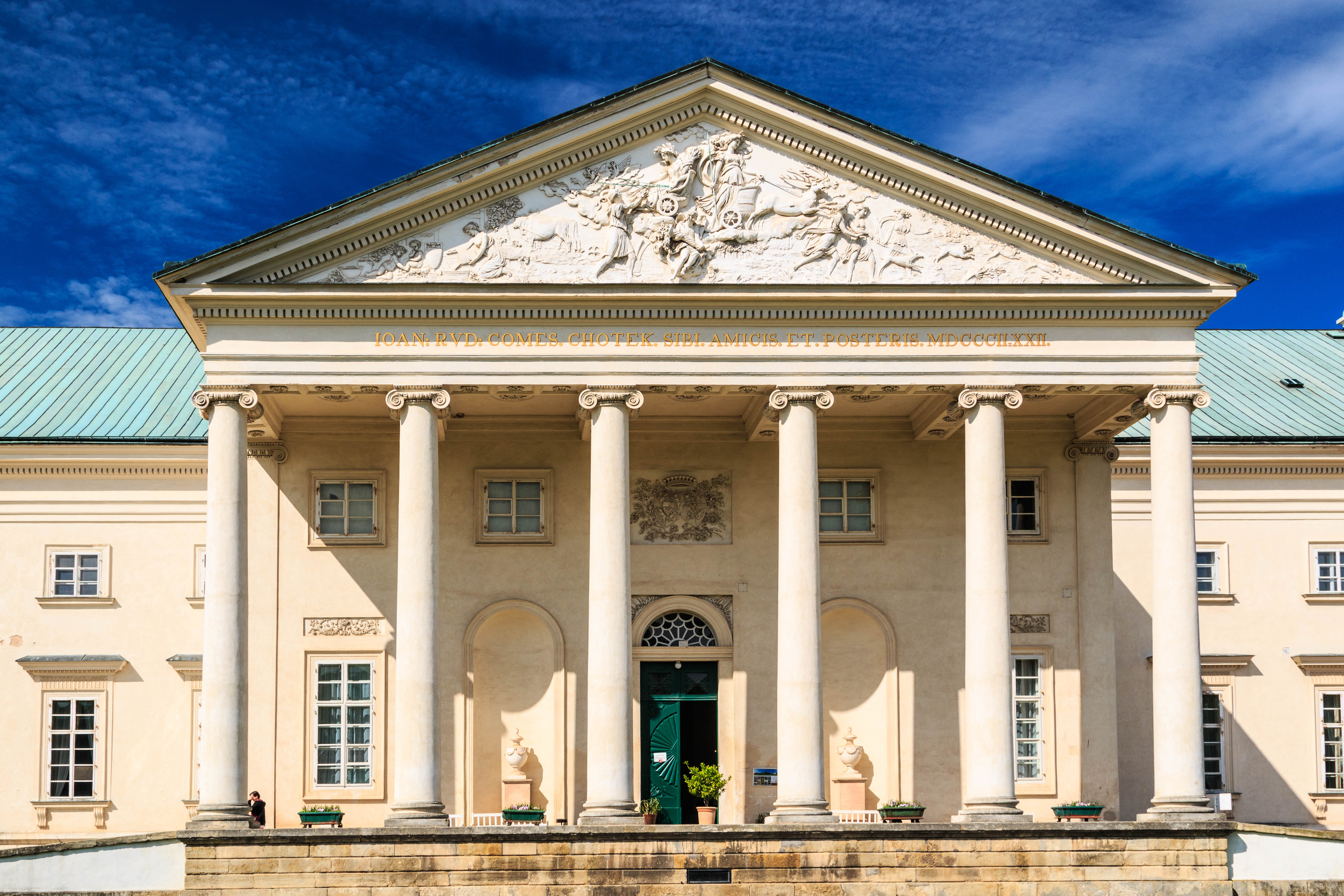 Zámek Kačina, Svatý Mikuláš 51, Svatý Mikuláš (okres Kutná Hora).